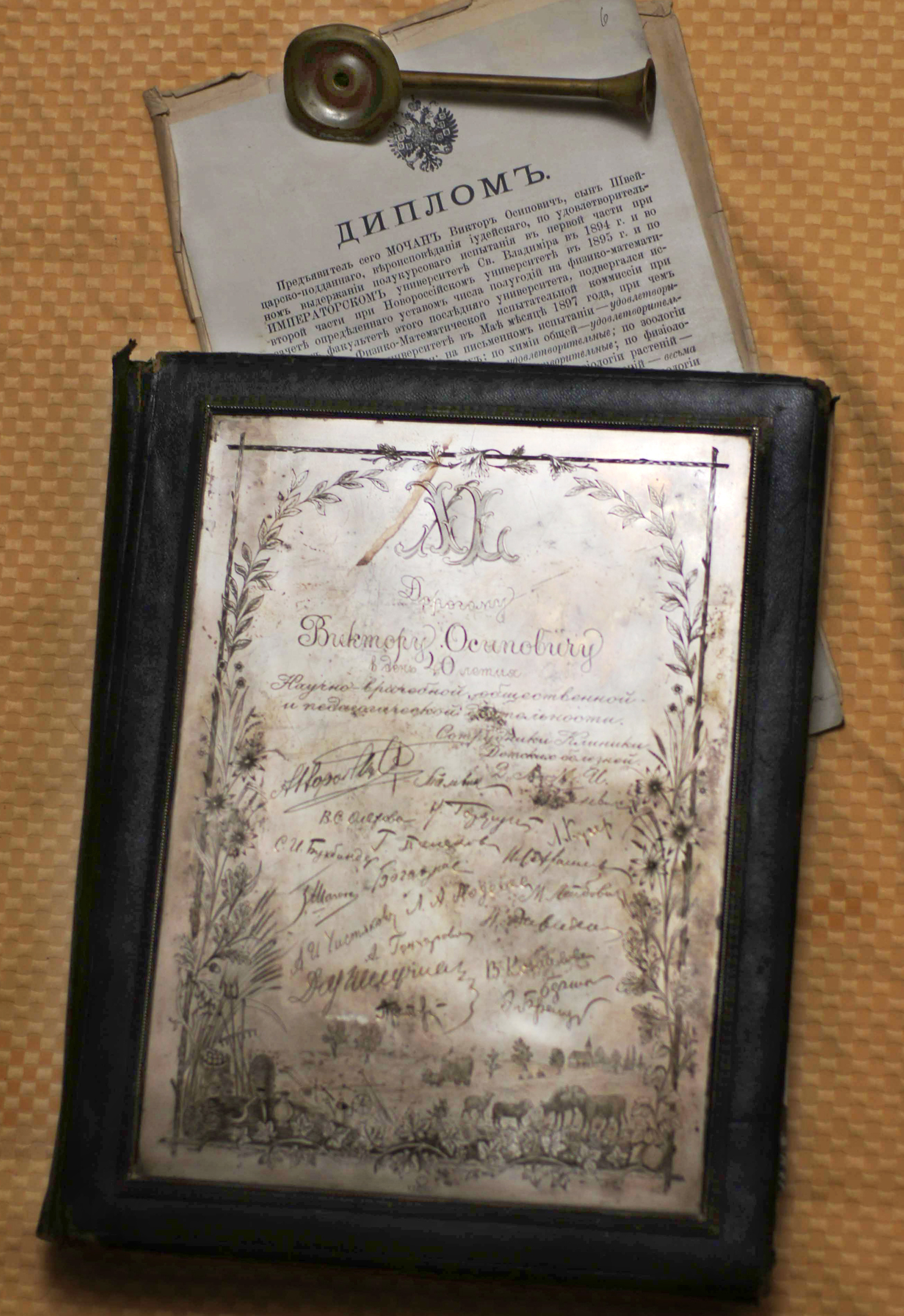 Диплом, стетоскоп и адрес профессора В. О. Мочана